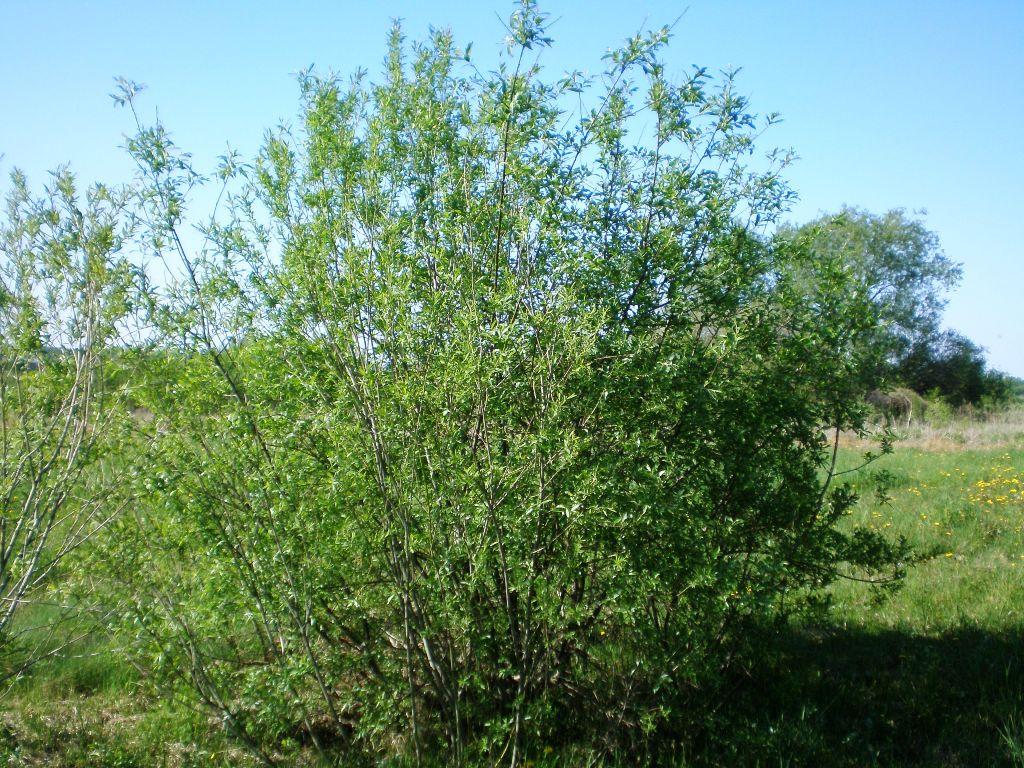 Salix viminalis